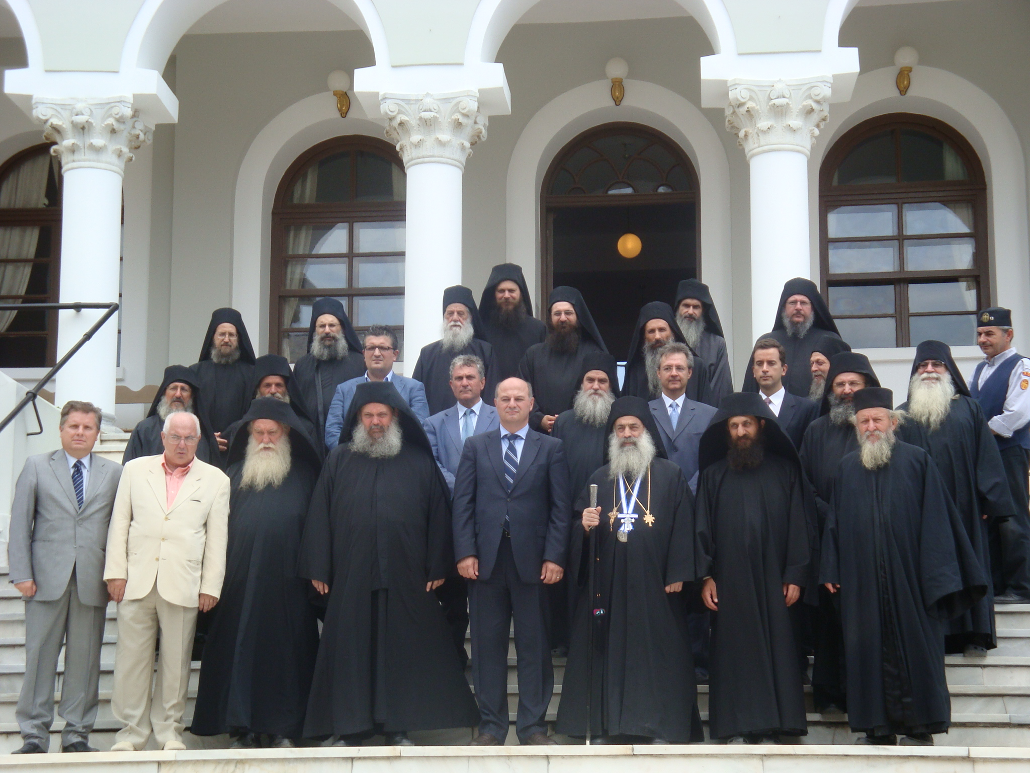 Στις 17-18 Ιουλίου 2012, ο Υφυπουργός Εξωτερικών Κωνσταντίνος Τσιάρας μετέβη στο Άγιον Όρος, προκειμένου να παραστεί στους εορτασμούς της πανήγυρης του Οσίου Αθανασίου του εν Άθω, ιδρυτή του κοινοβιακού μοναχισμού στο Άγιον Όρος, στην Ιερά Μονή Μεγίστης Λαύρας.